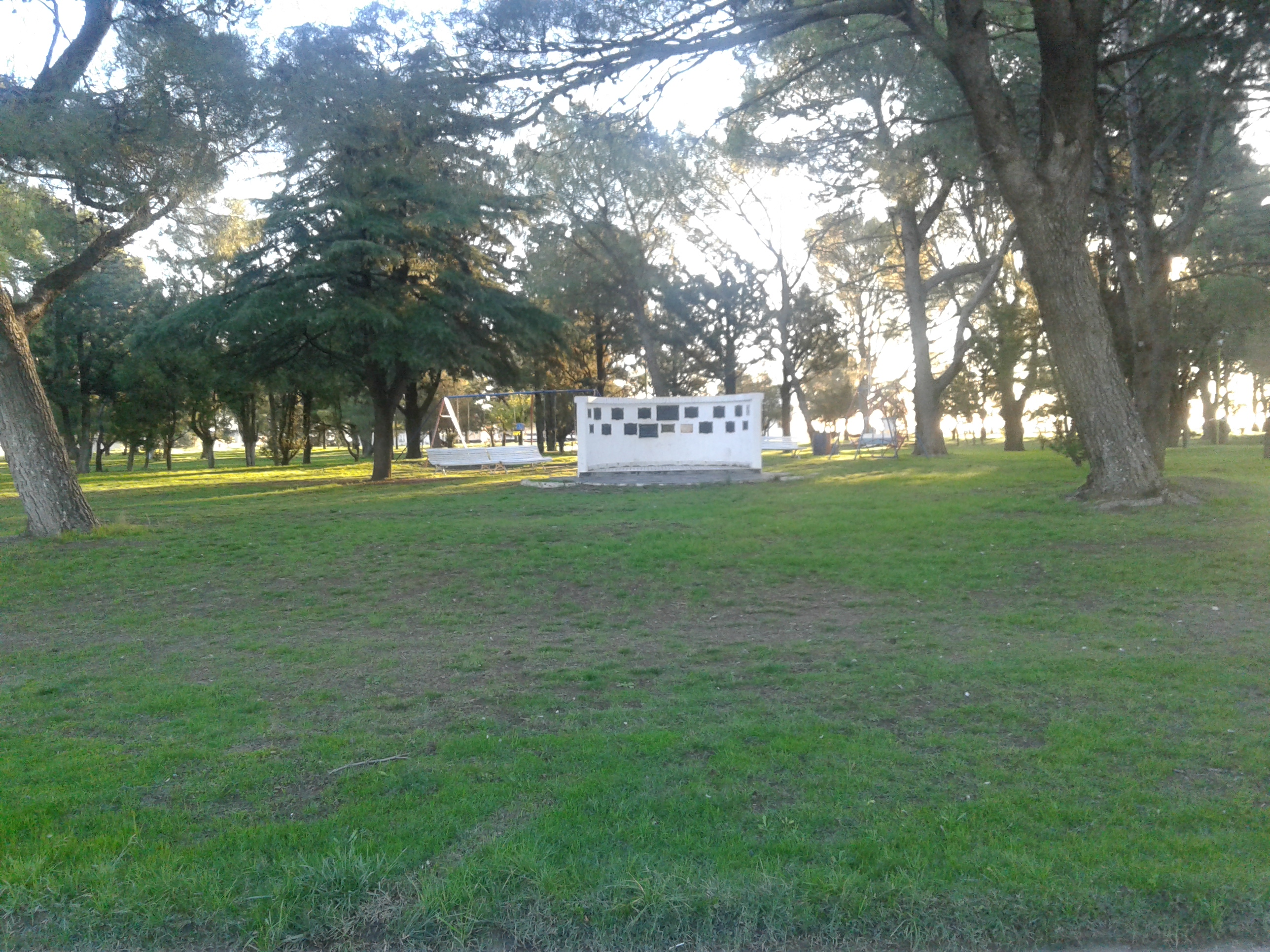 Plaza principal en el pueblo de Bajo Hondo, Provincia de Buenos Aires.